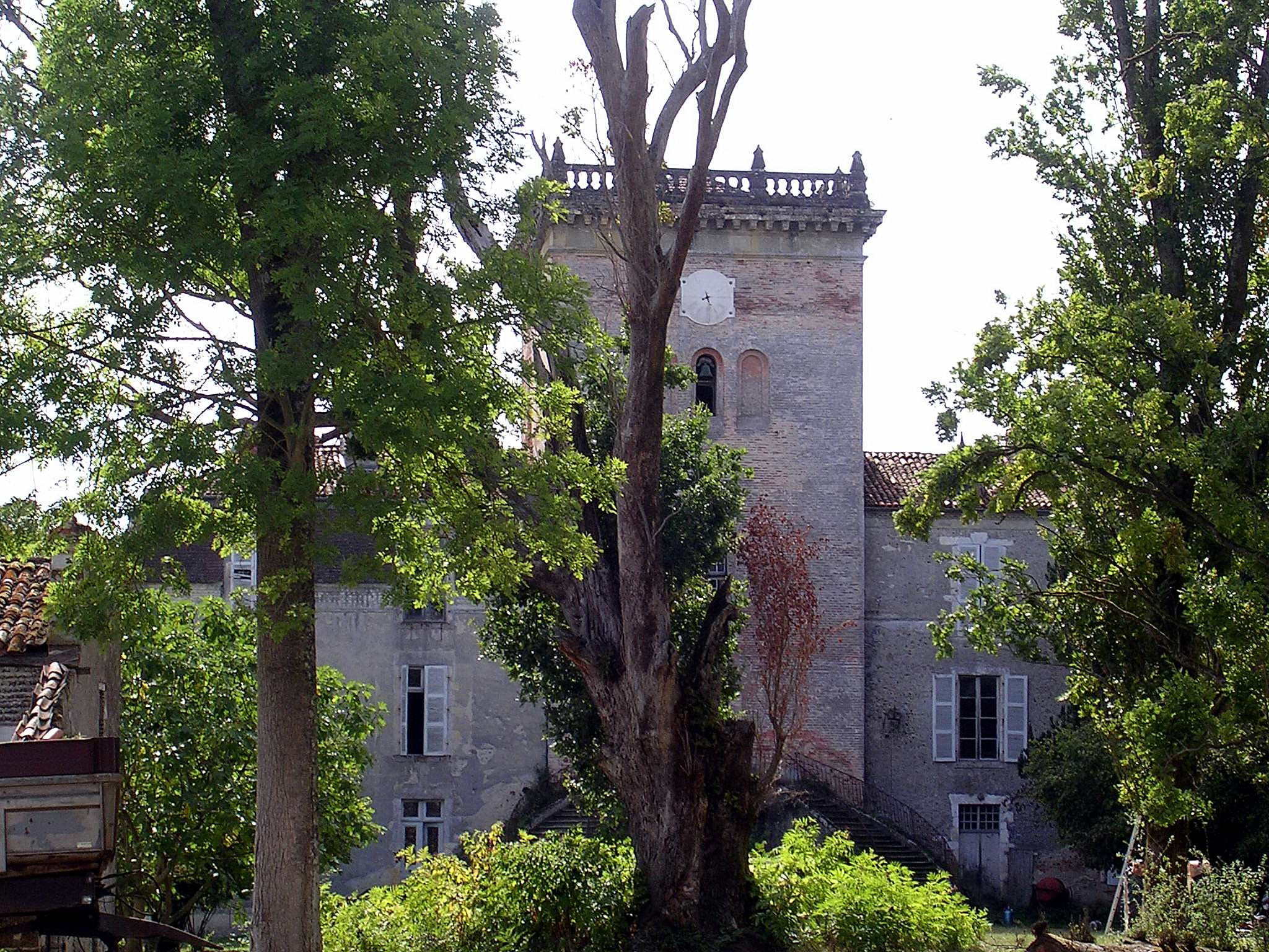 Château de Cauna, dans le département français des Landes